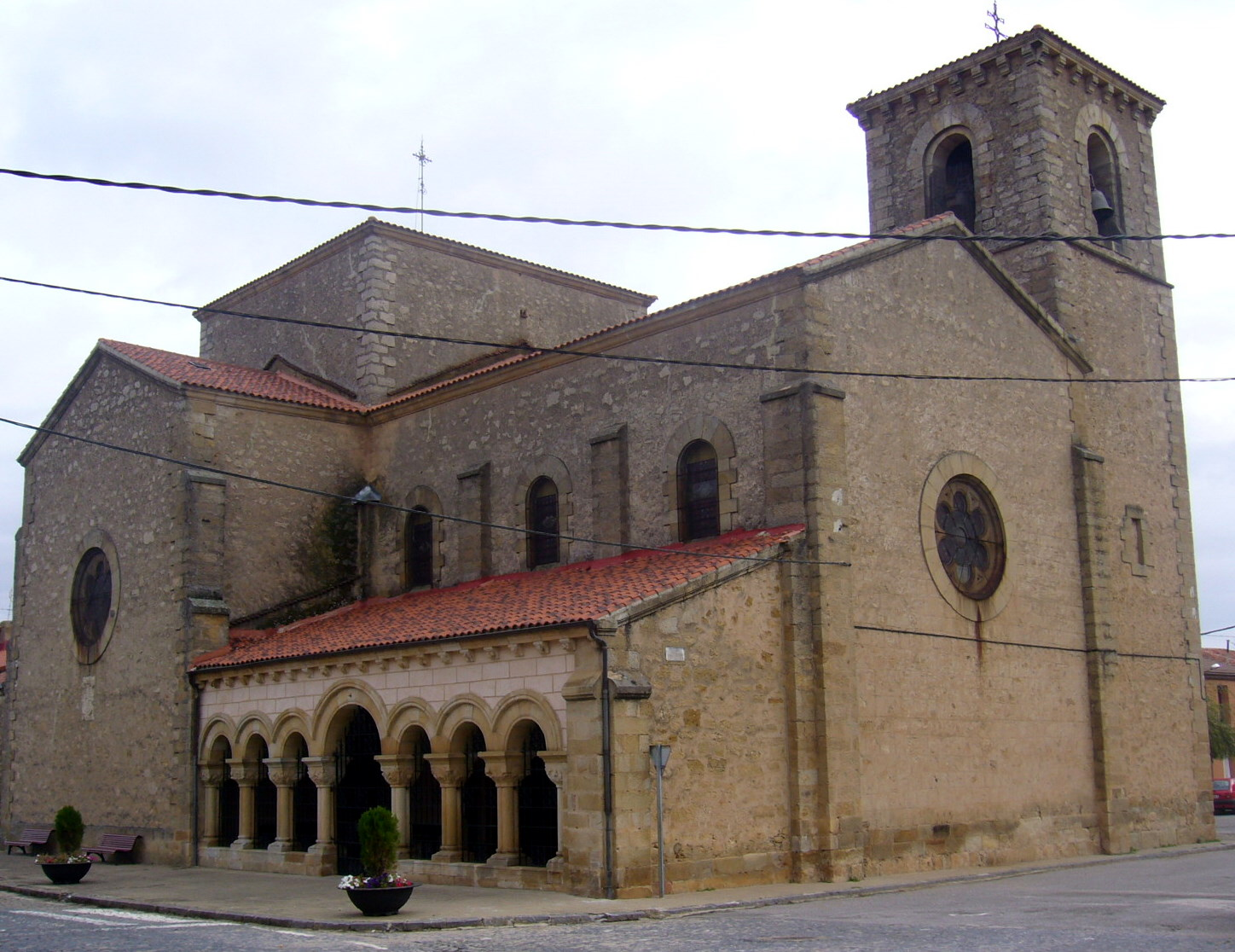 Iglesia de Nuestra Señora de la Asunción de Quintana Redonda, Soria (España).